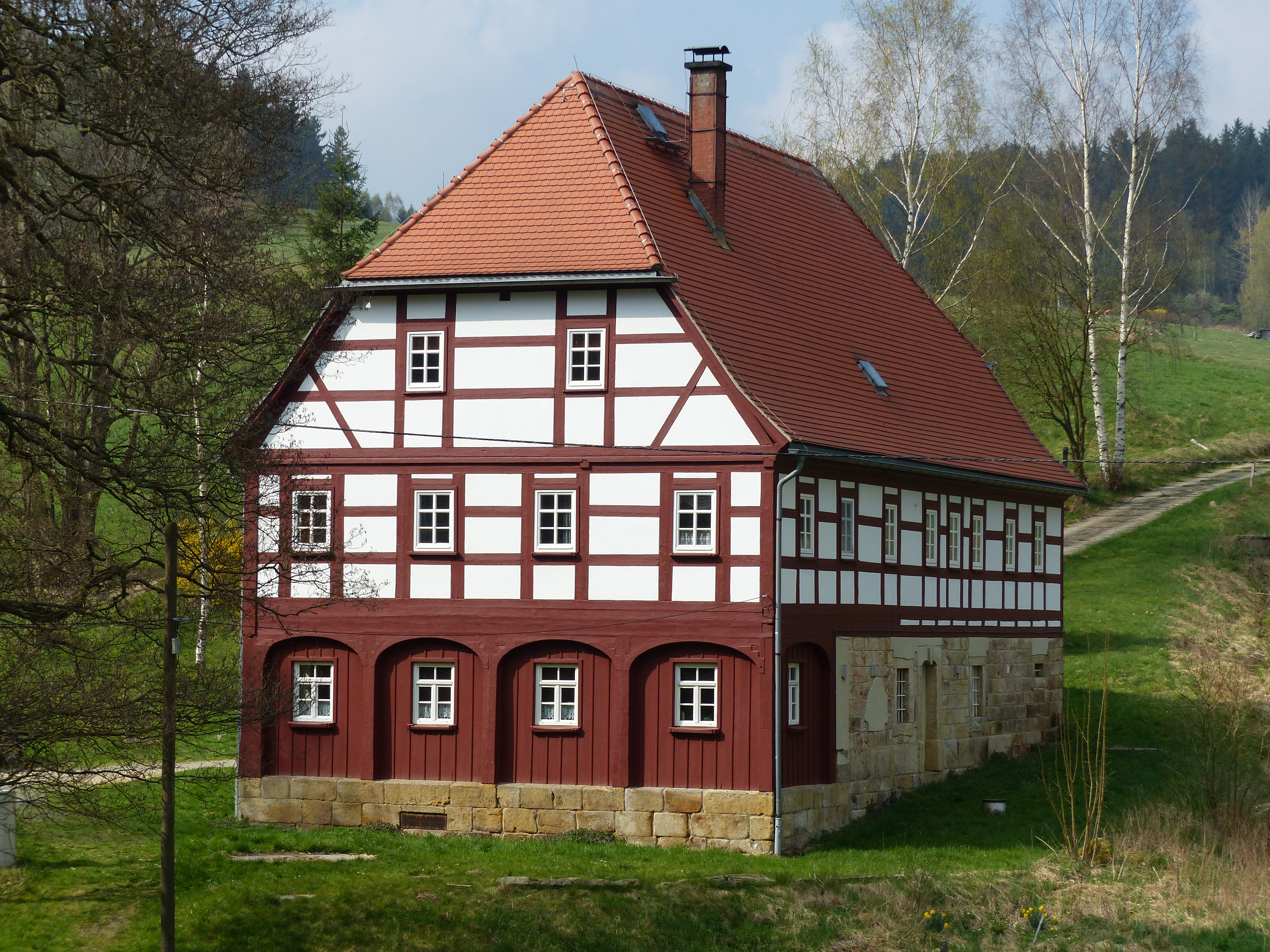 Saupsdorfer Hütte, Umgebindehaus, Hinteres Räumicht 1, Saupsdorf